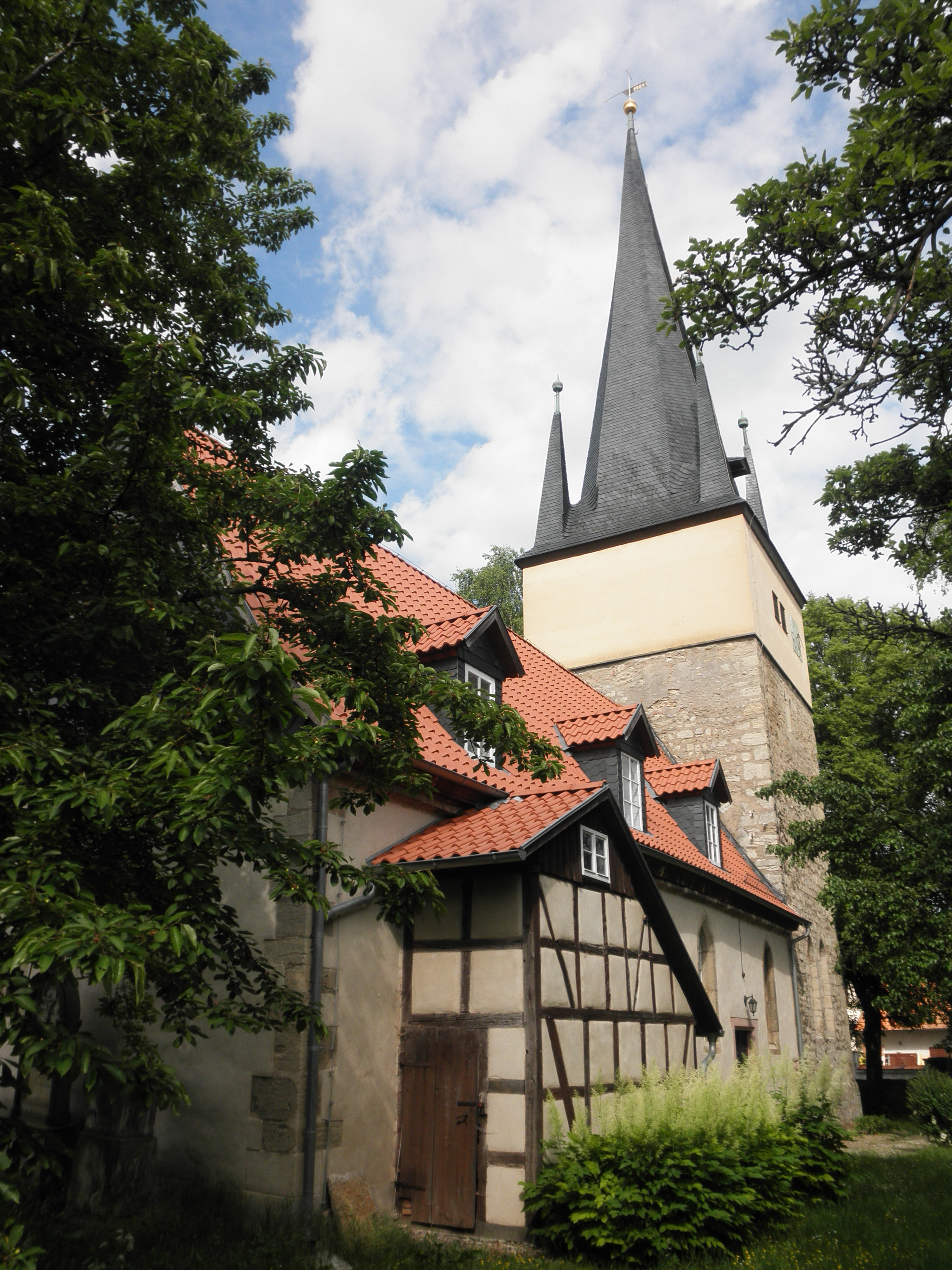 Kirche in Oberspier